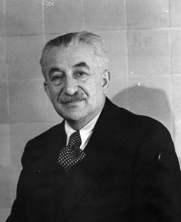 Ignacy Schwartzbart